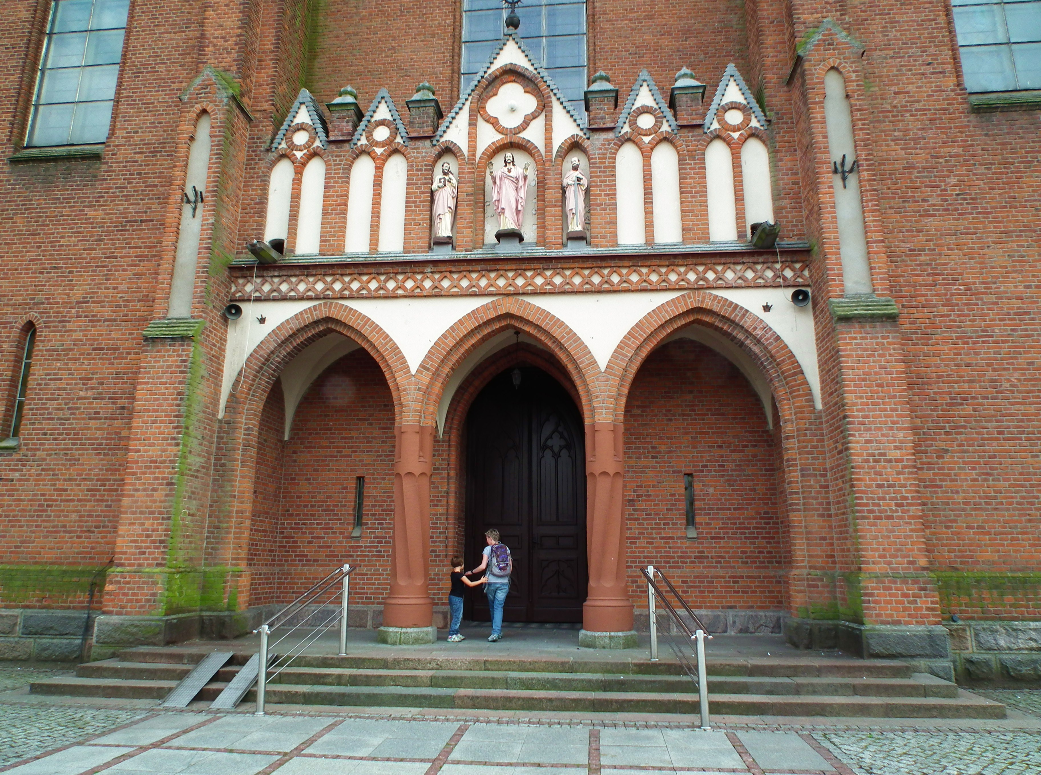 Bielsk - kościół par. pw. św. Jana Chrzciciela, 1910-1911.